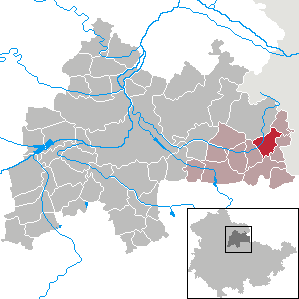 Hardisleben in Thuringia - District Sömmerda